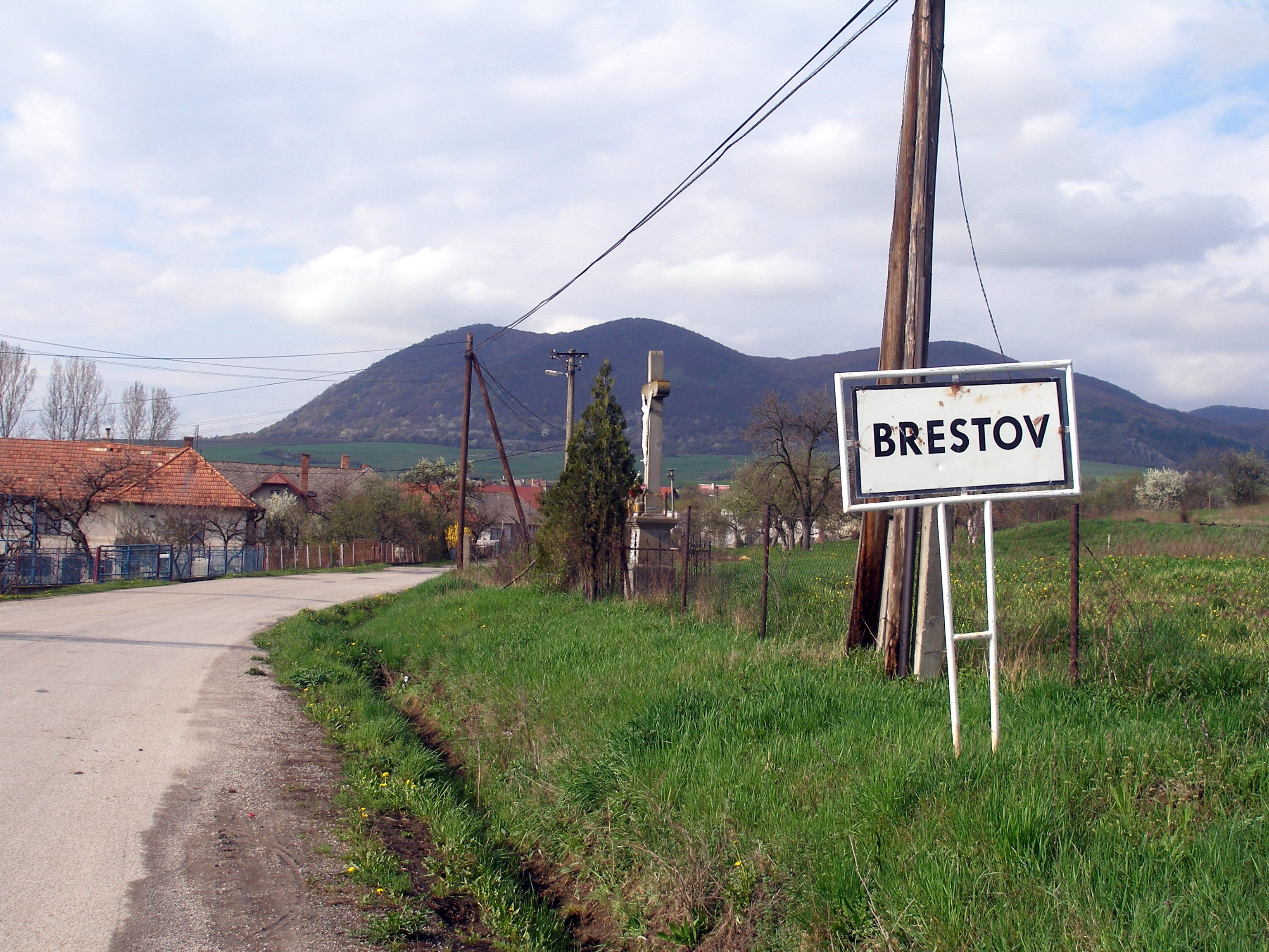 Obec Brestov okres Prešov, región Šariš